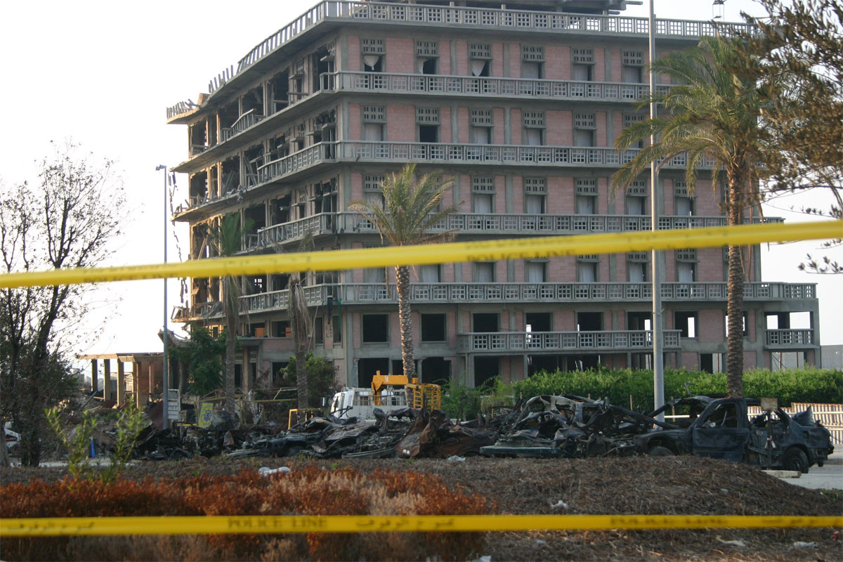 Blick von Südosten auf die abgesperrte Straße, in der die Autobombe gezündet wurde, die Rafiq Al-Hariri tötete. Das Gebiet wurde nach dem Anschlag bis zum Abschluss der internationalen Untersuchung abgesperrt. Die Fahrzeuge befinden sich nicht mehr in den Positionen wie unmittelbar nach dem Anschlag.